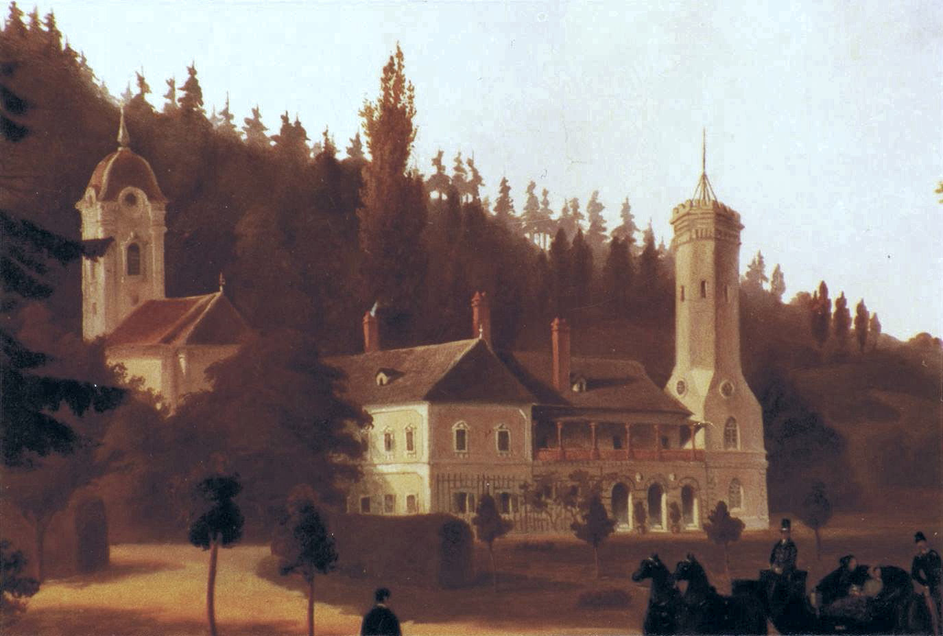 Gemälde des Schlosses Linsberg